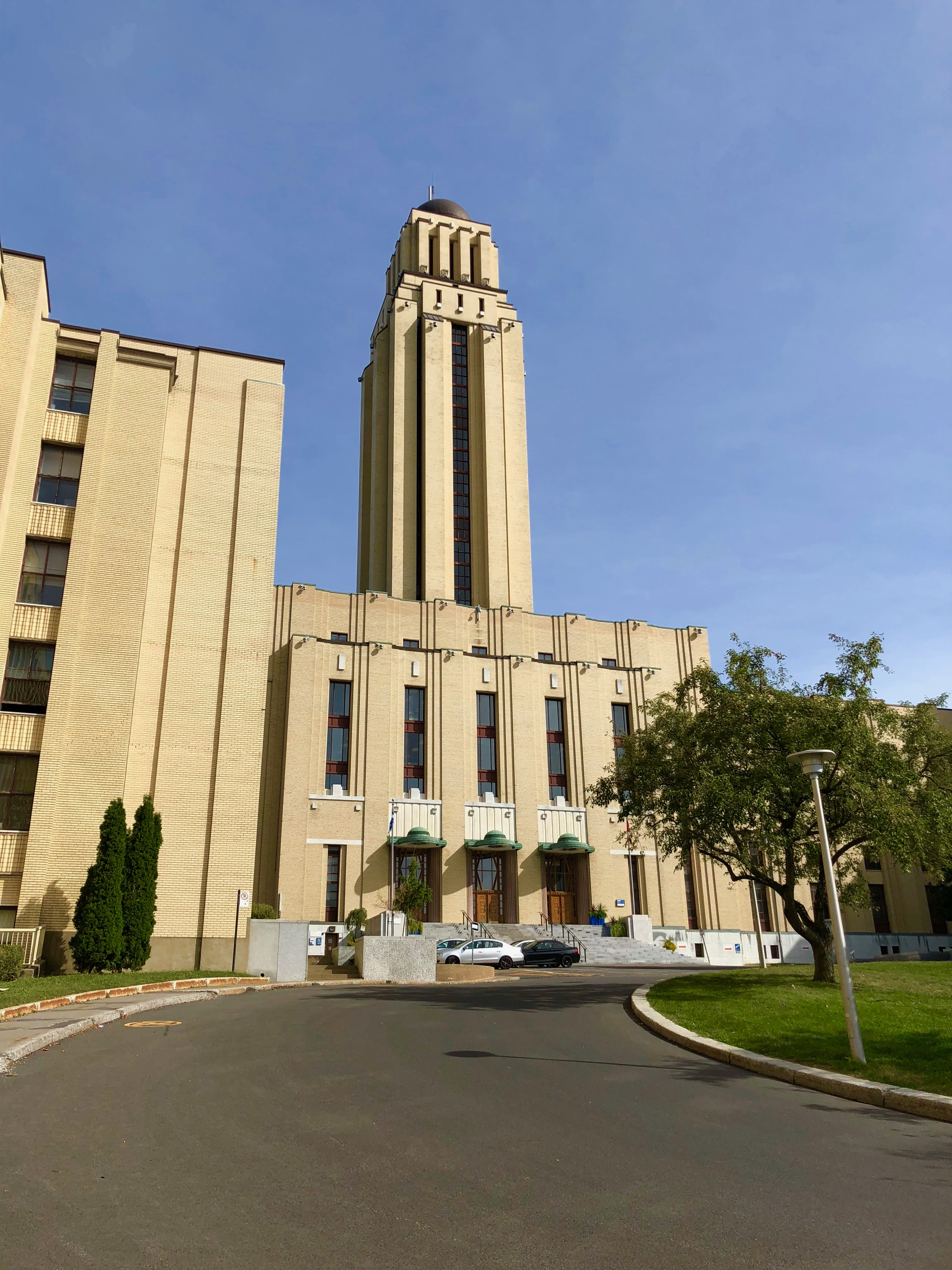 モントリオール大学 Roger-Gaudry棟